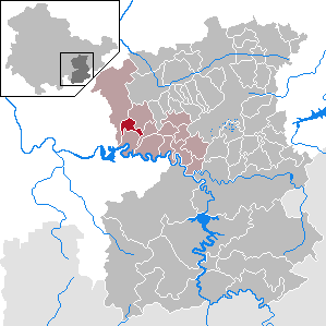 Seisla in Thuringia - Saale-Orla-Kreis